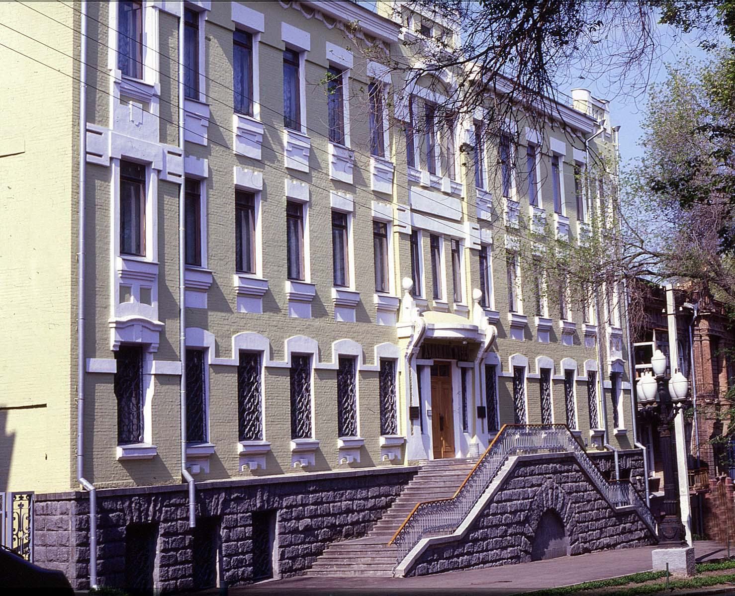 Будинок художнього музею, Дніпро, вул. Шевченка, 21